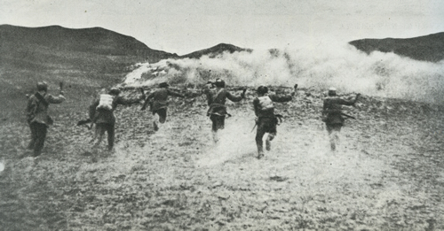 1942年5月14日，八路军358旅在田家会战斗中，八路军向日军发起冲锋